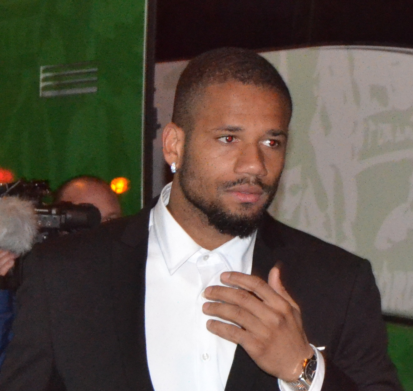 O futbolista